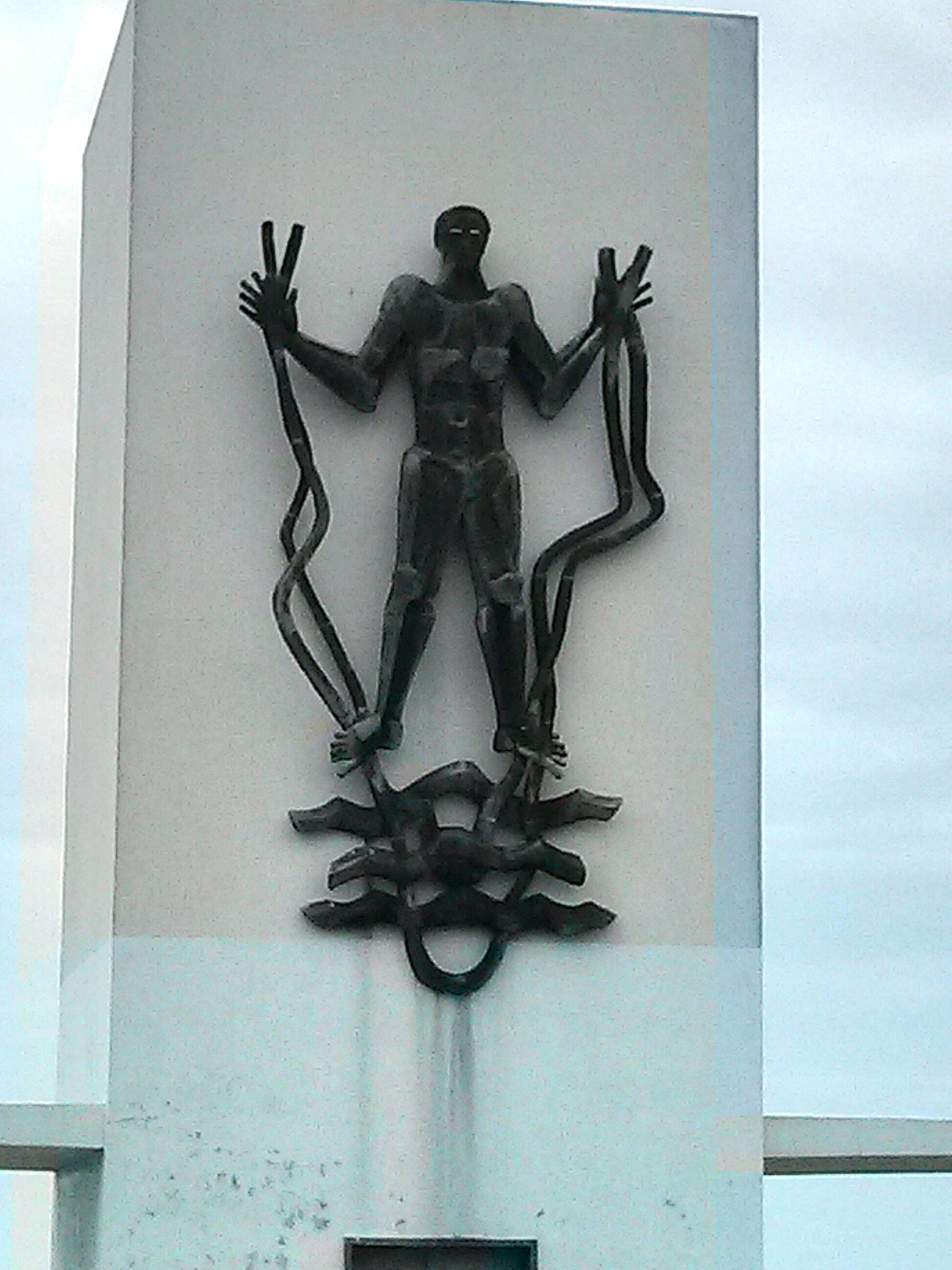 oporto